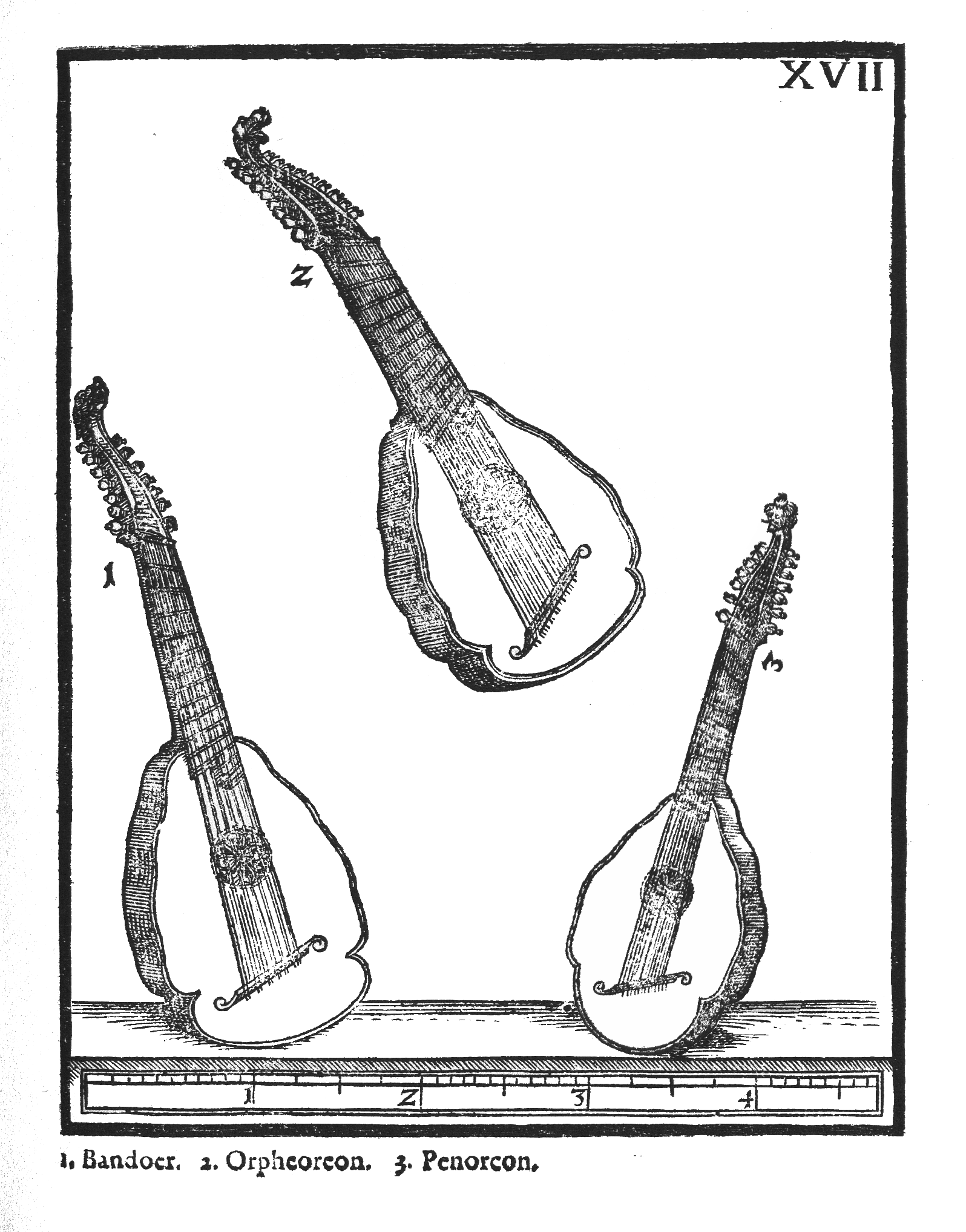 Syntagma Musicum Theatrum Instrumentorum seu Sciagraphia Wolfenbüttel 1620